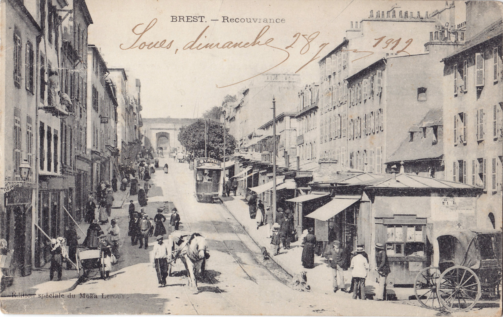 Carte postale ancienne éditée par edition spéciale du Moka leroux :BREST - RECOUVRANCE